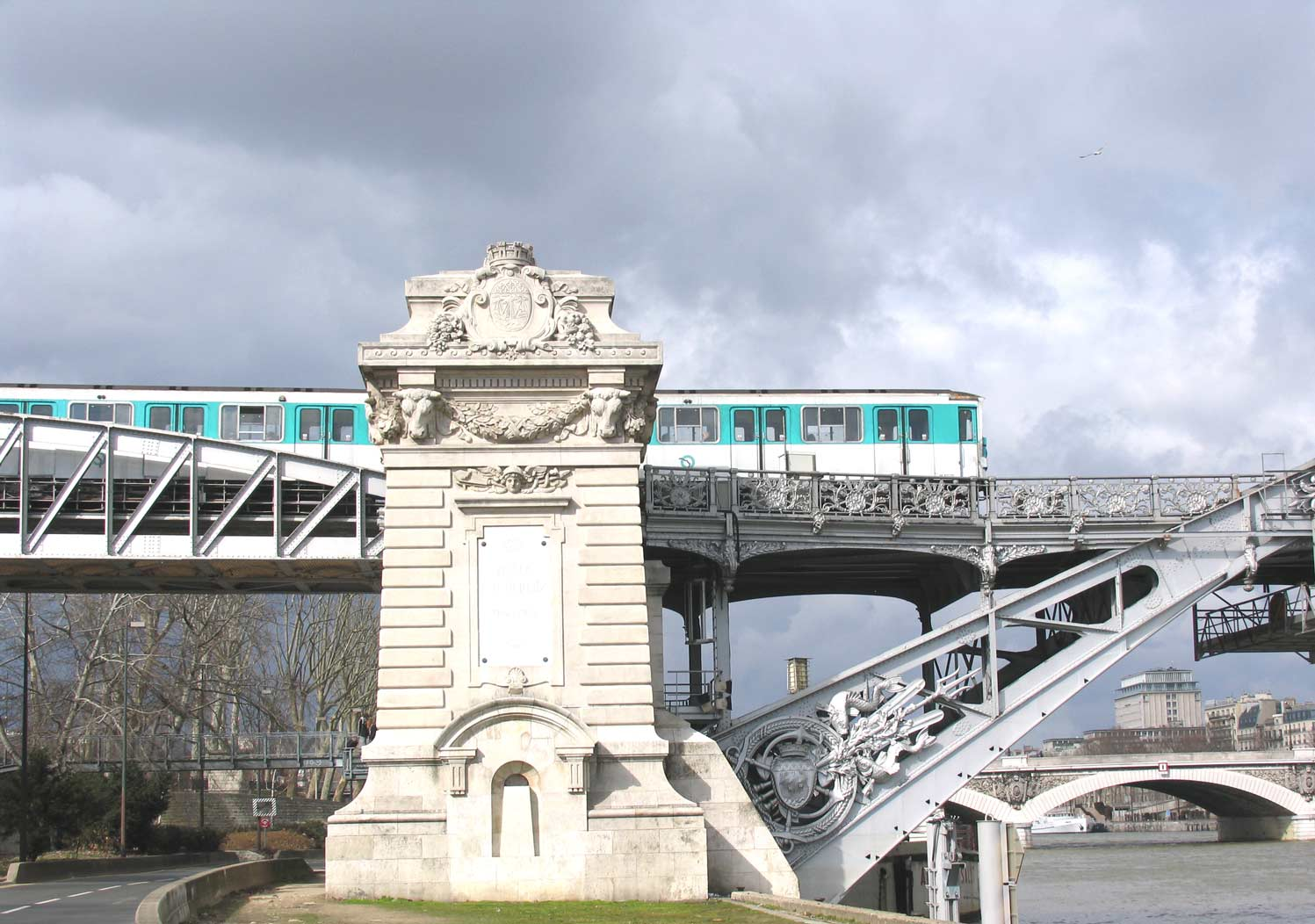 Metro de Paris Ligne 5 Viaduc d'Austerlitz Lieu : Paris, France Date : Juin 2006 Auteur : Pline photo personnelle